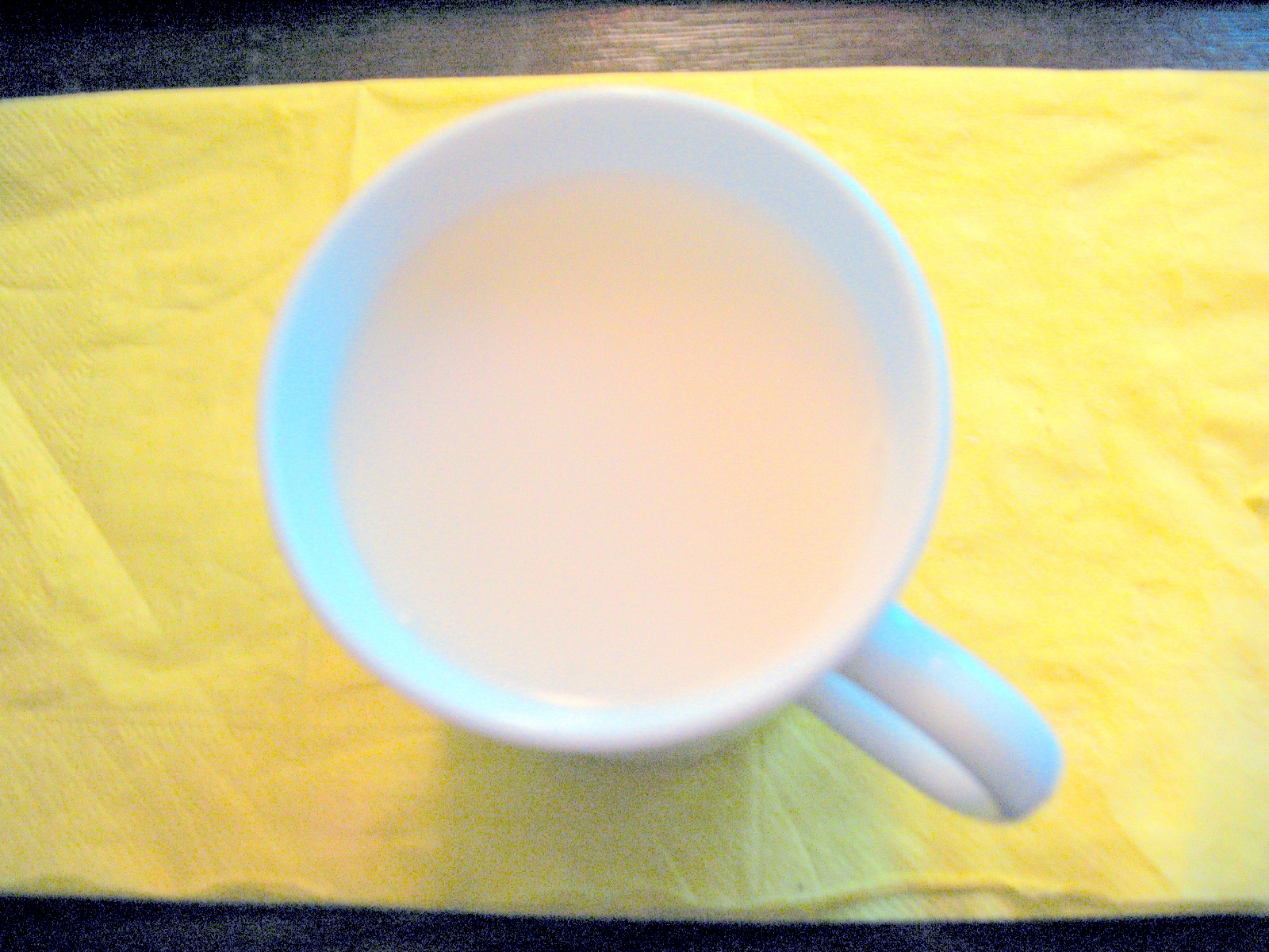 Viana rice milk in a cup